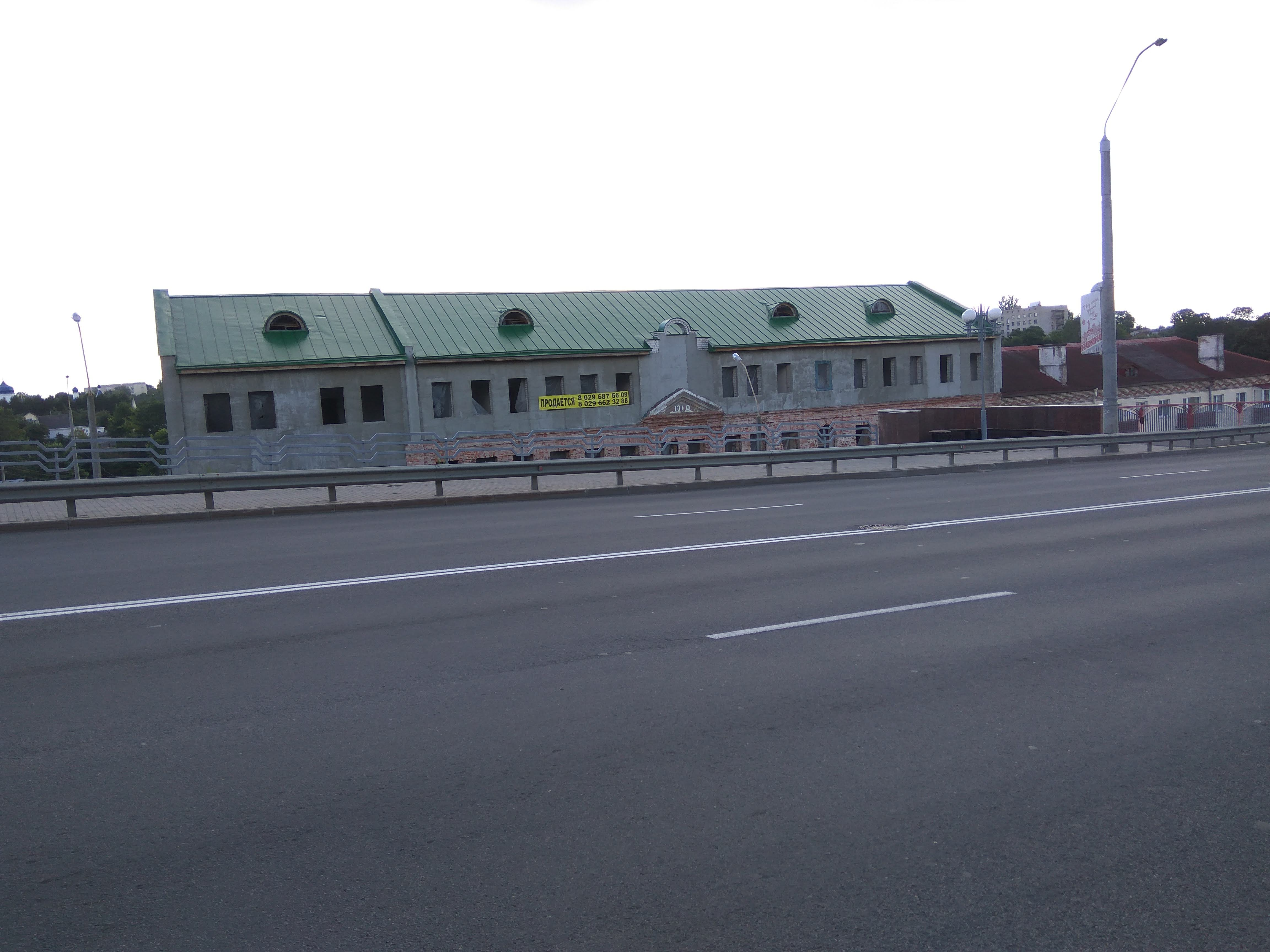 Магілёў. Вуліца Лазарэнкі (ліпень 2018)